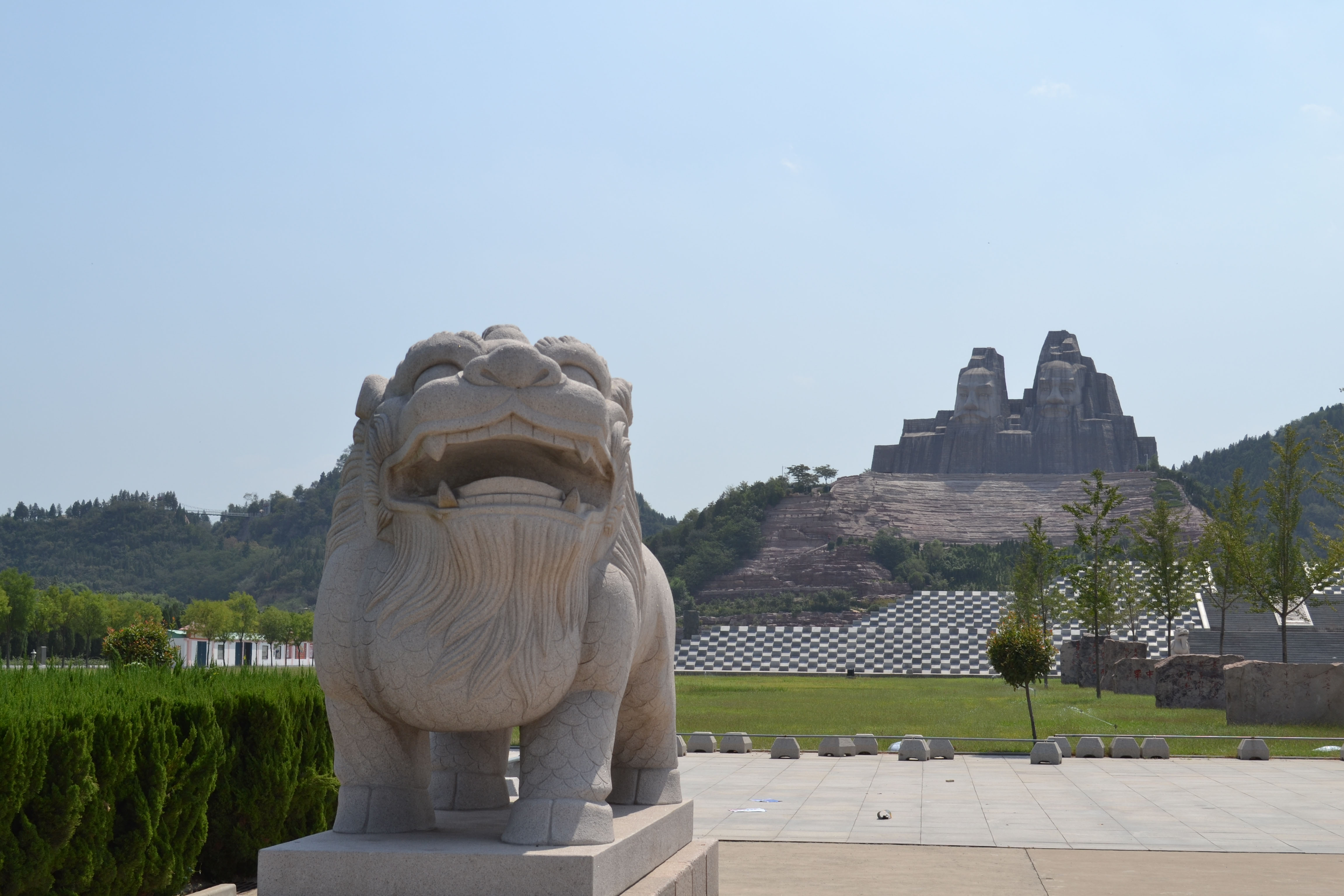 中文（中国大陆）: 主体为郑州黄河风景名胜区炎黄二帝巨型雕像